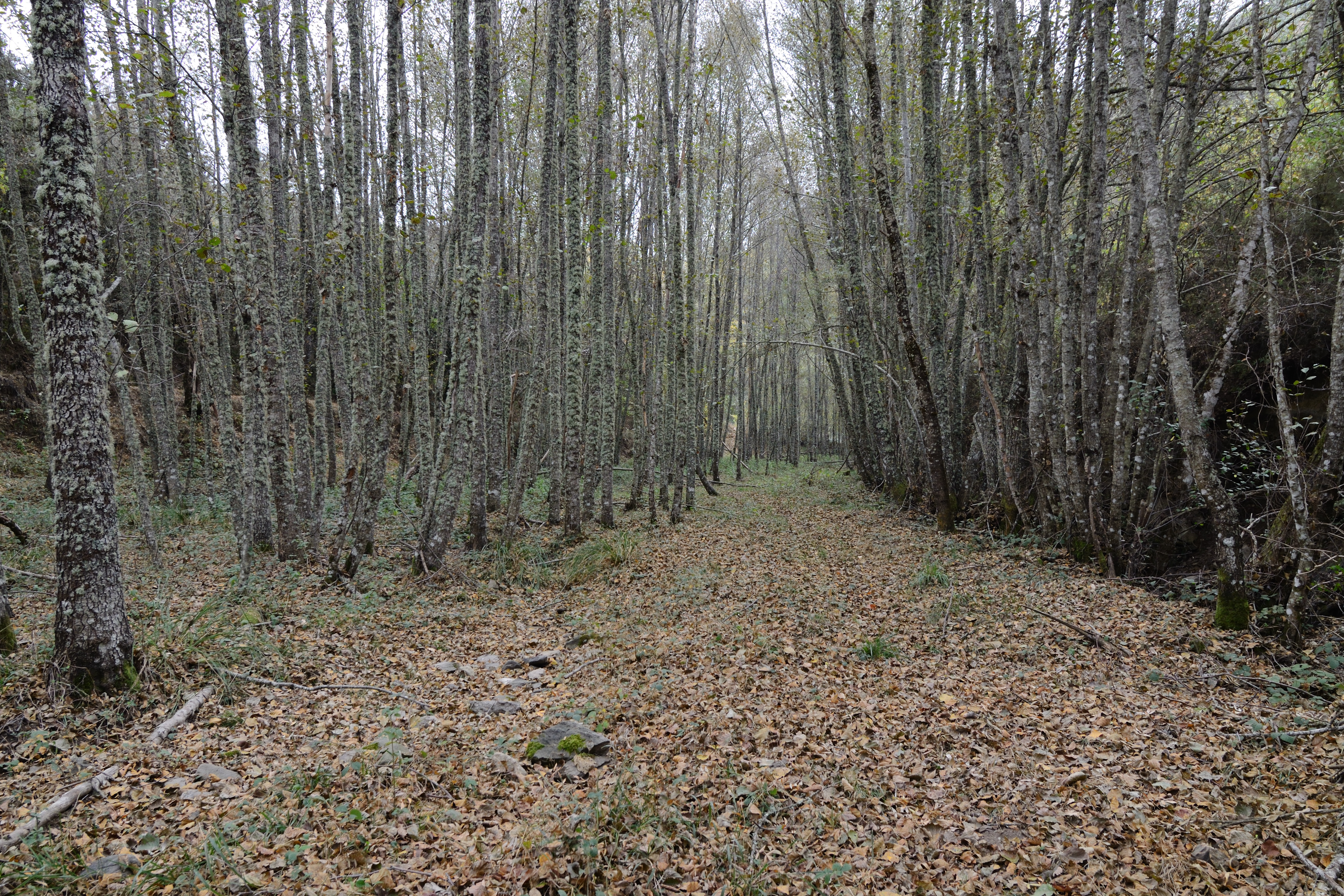 Vilarinho de Cova da Lua, Portugal [2011]